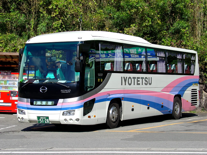 事業者: 伊予鉄道 陸運登録: 愛媛200か5128 シャーシ: 日野自動車 セレガ ADG-RU1ESAA 車体: ジェイ・バス セレガ ハイデッカ 年式: 2006年 撮影場所: 別府市